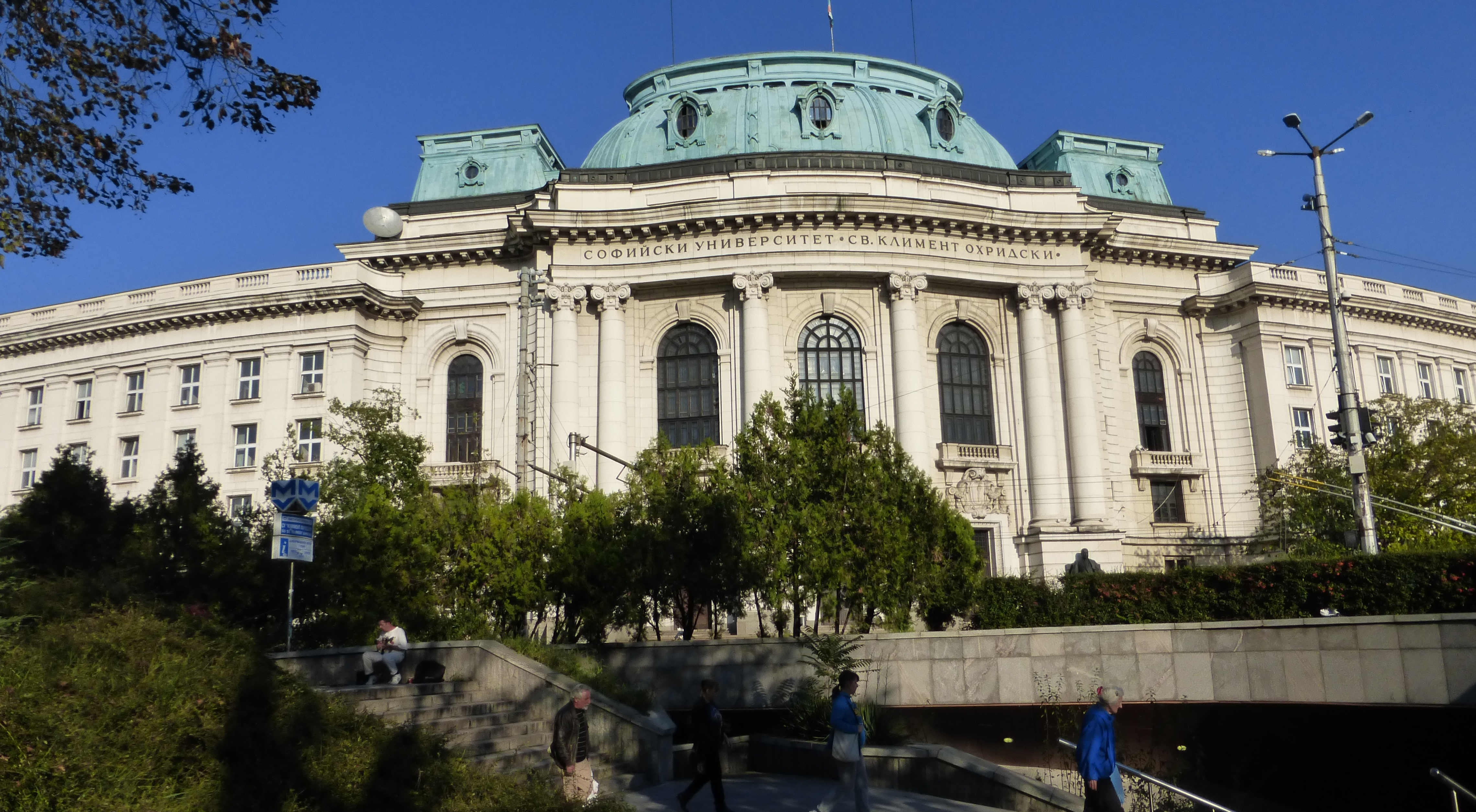 Софийский университет имени Св. Климента Орхидского